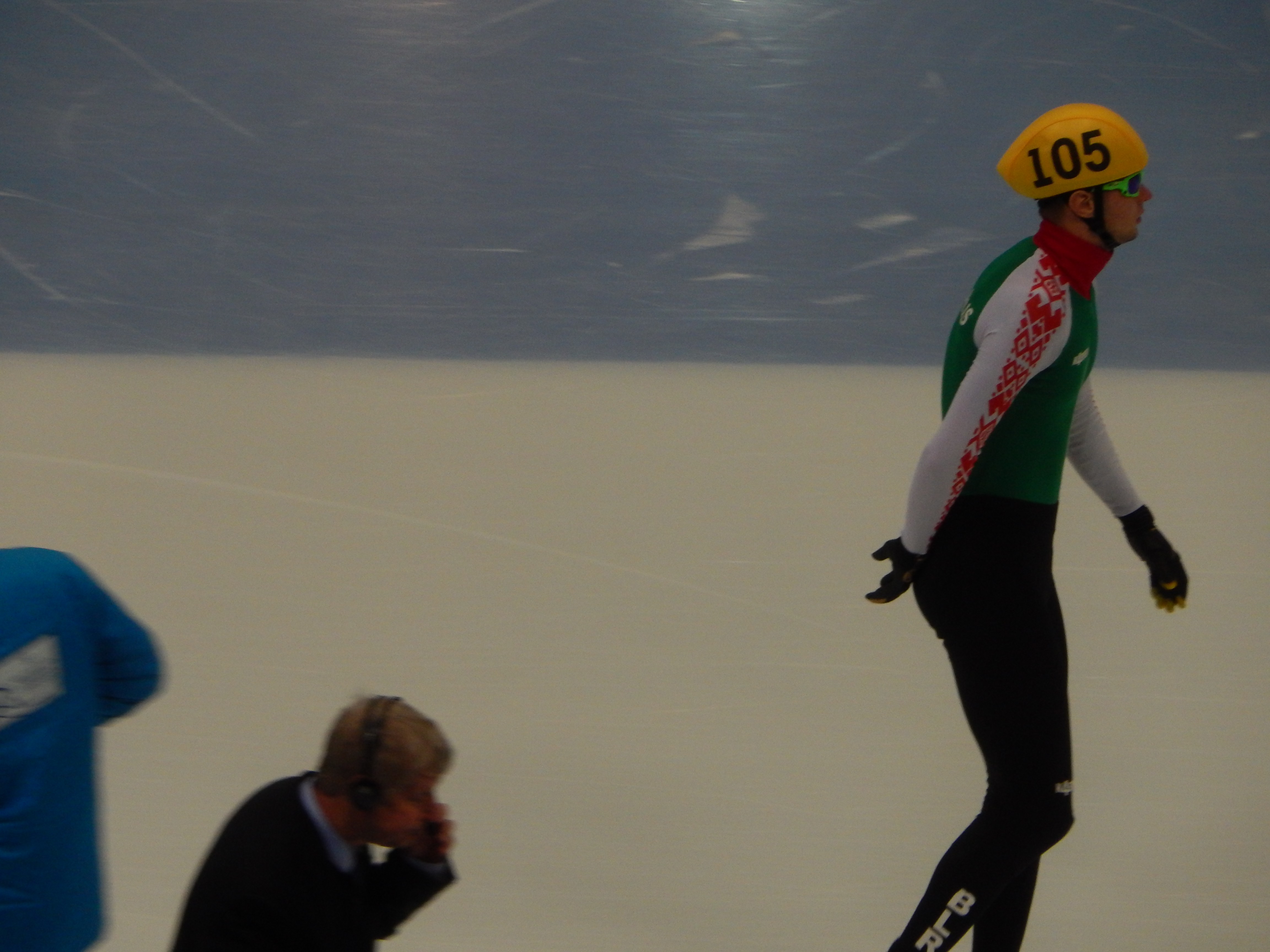 Чемпионат мира по шорт-треку 2015 в Москве Квалификационный раунд, 7 забег, 1000 м, мужчины